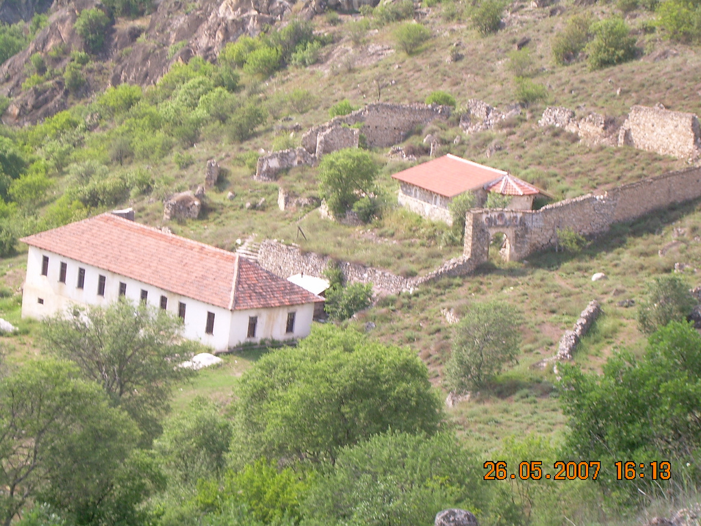 Манастирот „Св. Димитрија Солунски“ кај Зовиќ, Мариово (Чебренски манастир)